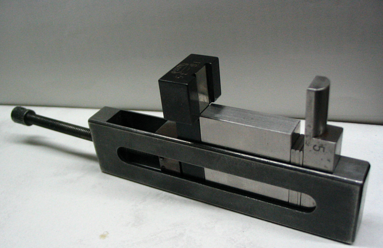 Endmaß-Zange zum kalibrieren von Innenmessgeräten